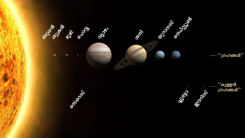 സൗരയൂഥത്തിലെ ഗ്രഹങ്ങളും കുള്ളൻ ഗ്രഹങ്ങളും